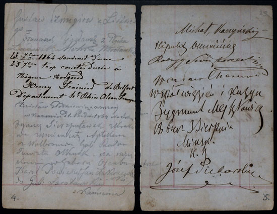 Запісная кніжка бацькі Каруся Каганца К.К. Кастравіцкага з гаспадарчымі запісамі і аўтографамі паўстанцаў 1813 – 1864 гг.